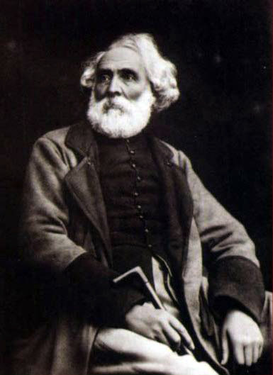 Portrait d'Auguste Migette (1802-1884) par Marmand.